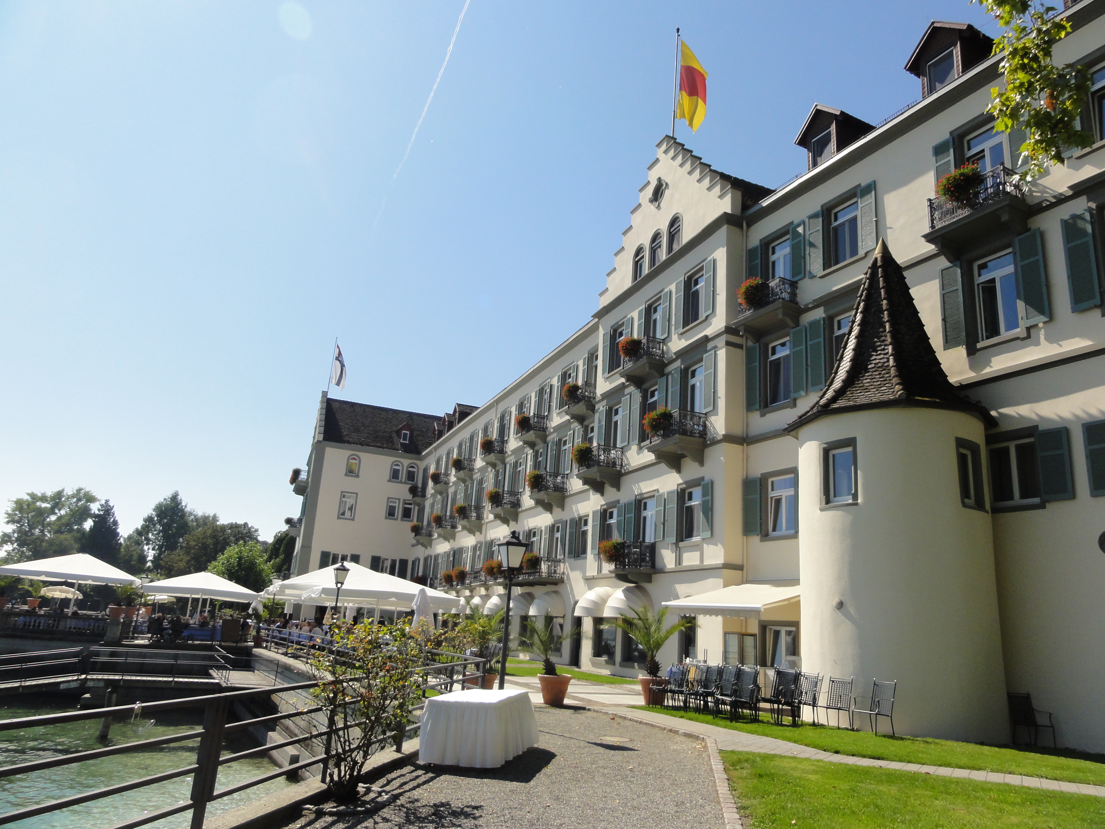 Konstanz, Steigenberger Hotel, Seeseite mit dem runden Hussenturm, in dem Jan Hus eingekerkert wurde. GPS data may be inaccurate. EXIF data regarding date and time may be inaccurate.